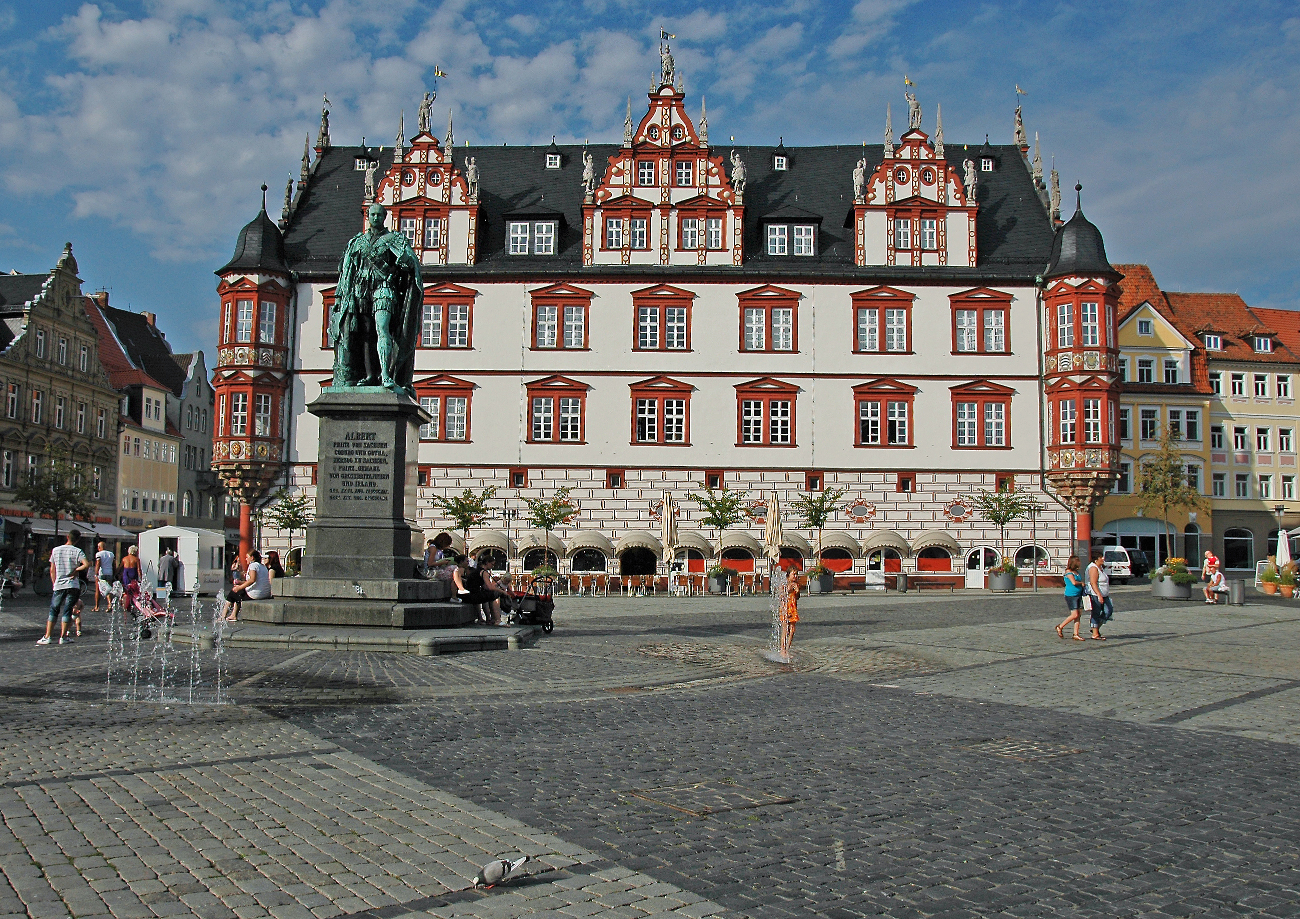 Coburger Stadthaus